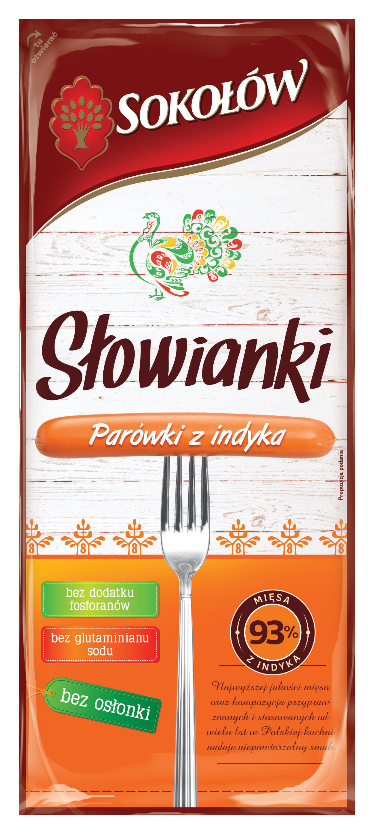 Sokołów S.A. Słowianki z Indyka